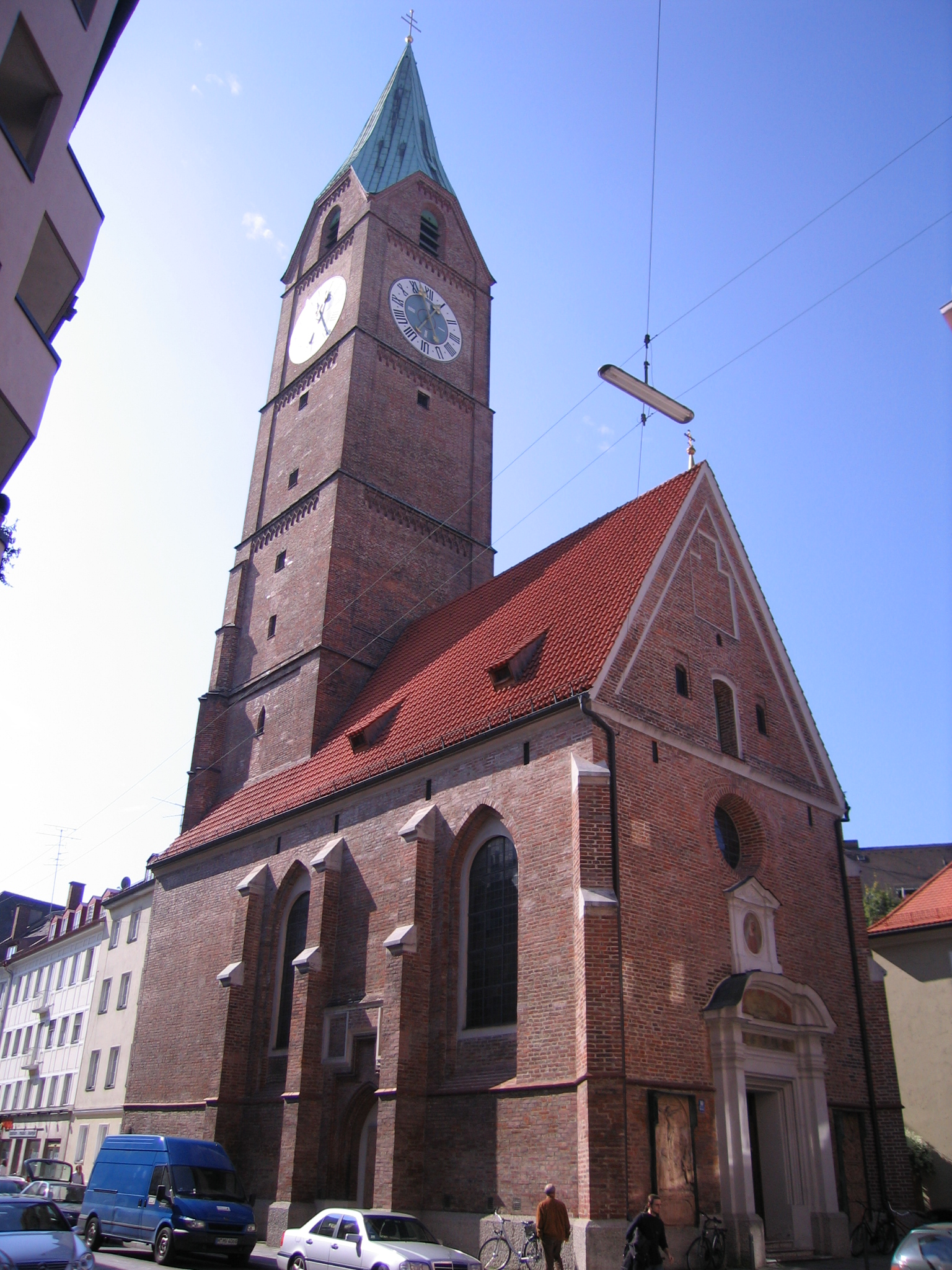 Kreuzkirche, Munich